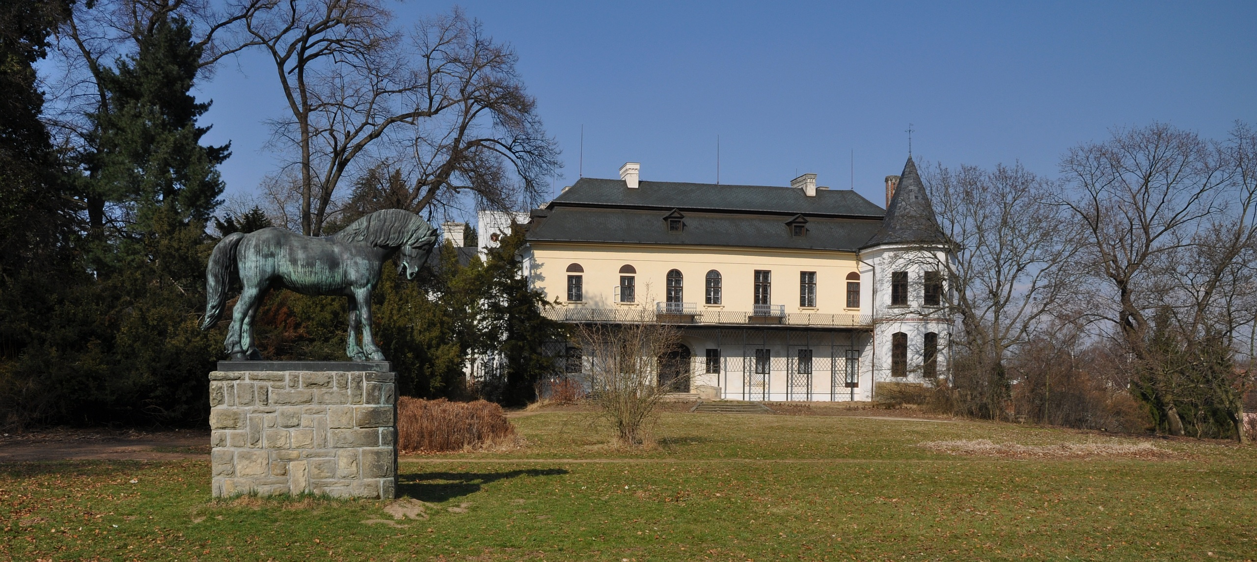 Slatiňany, zámek